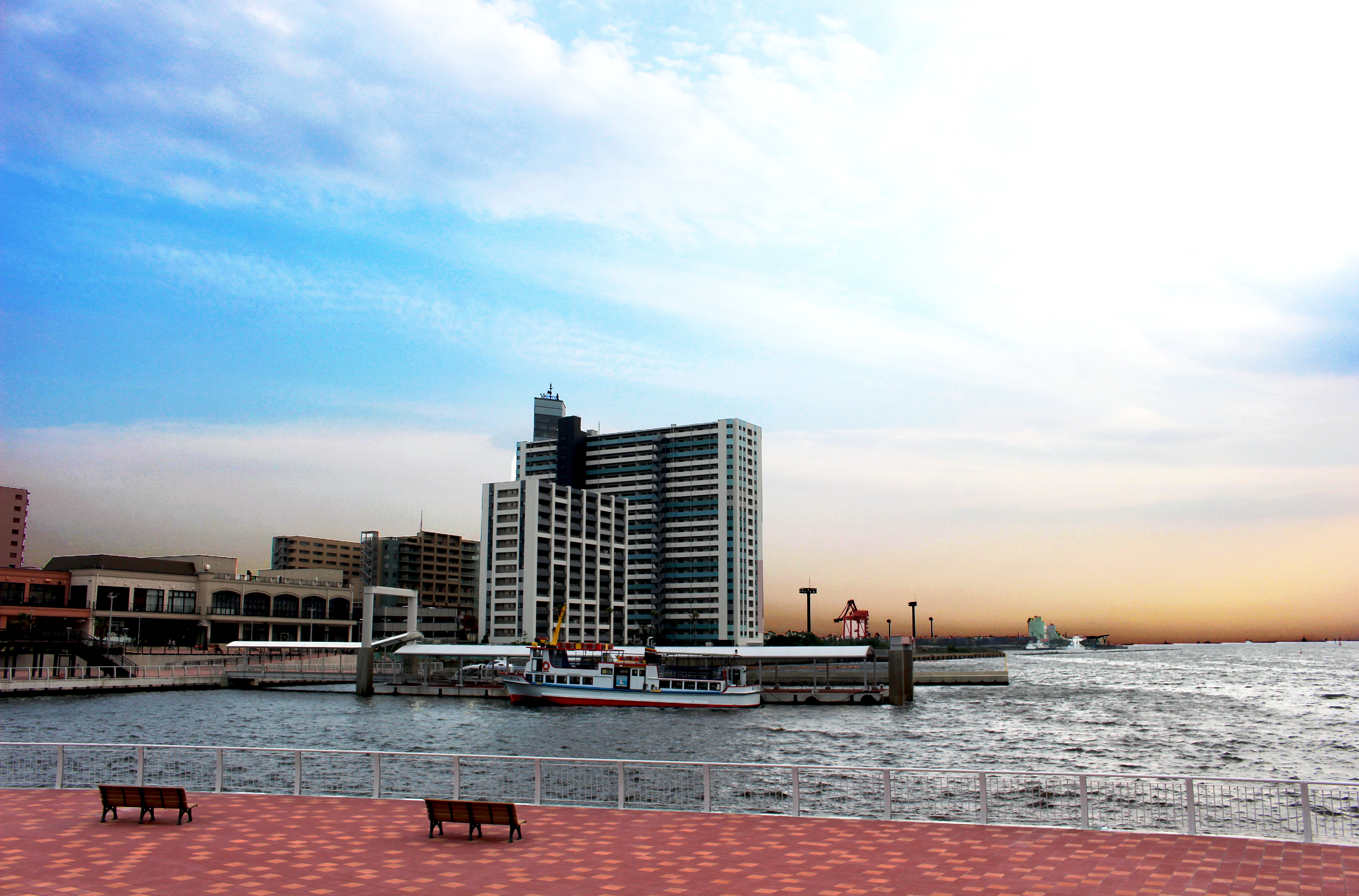 千葉みなと桟橋からの景色（2016年6月撮影）